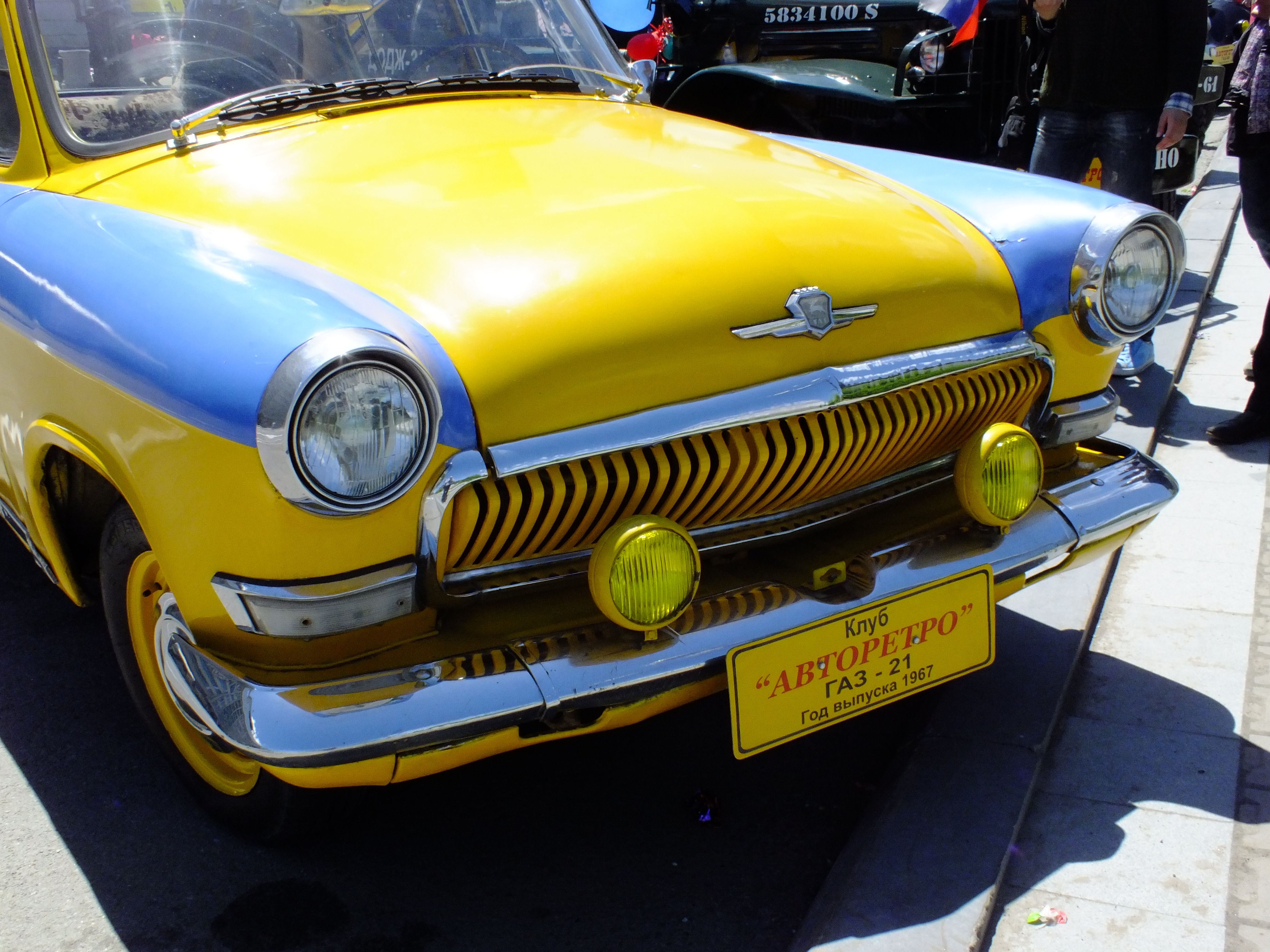 Volga GAZ-M-21/GAZ-21